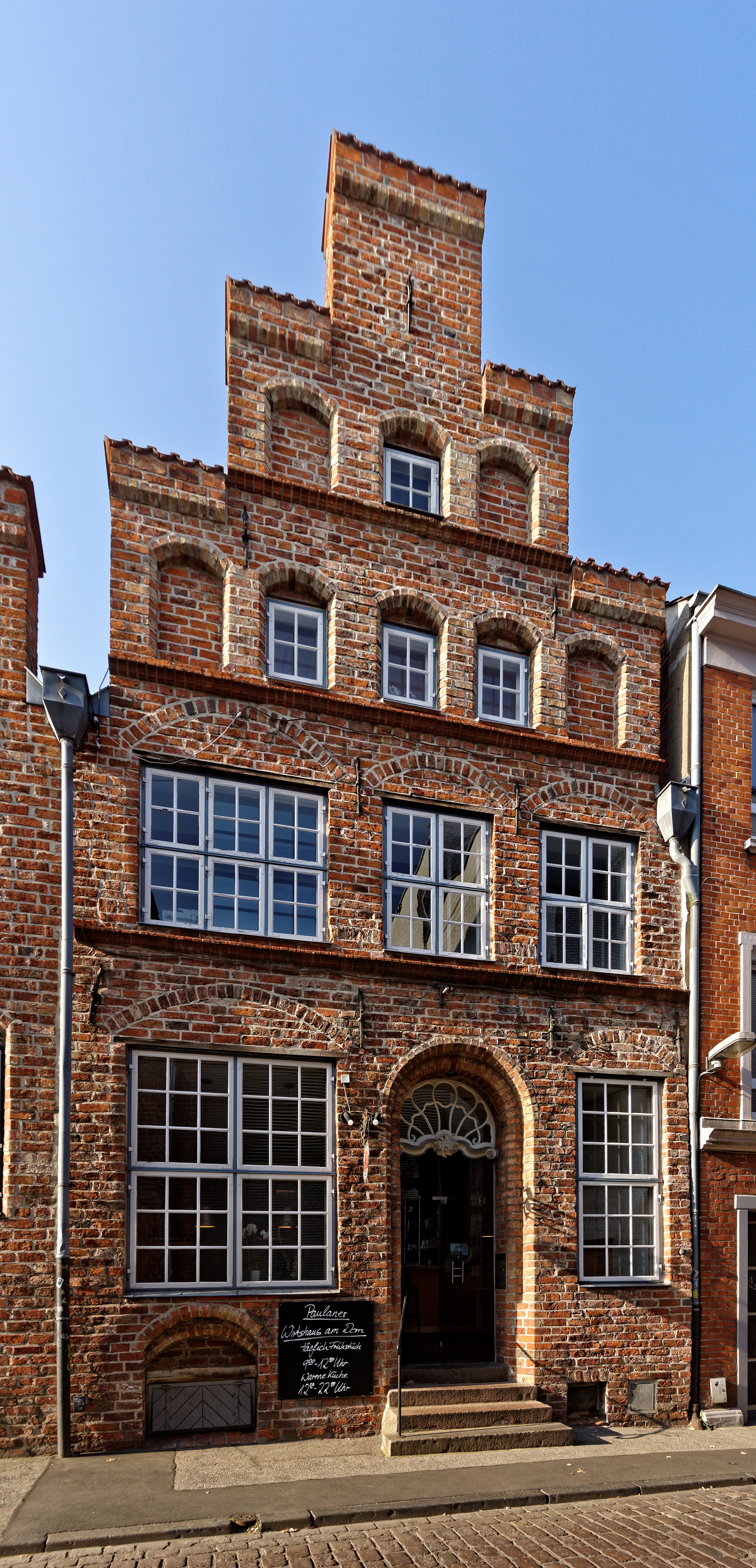 Lübecker Altstadt, Kapitelstraße 4